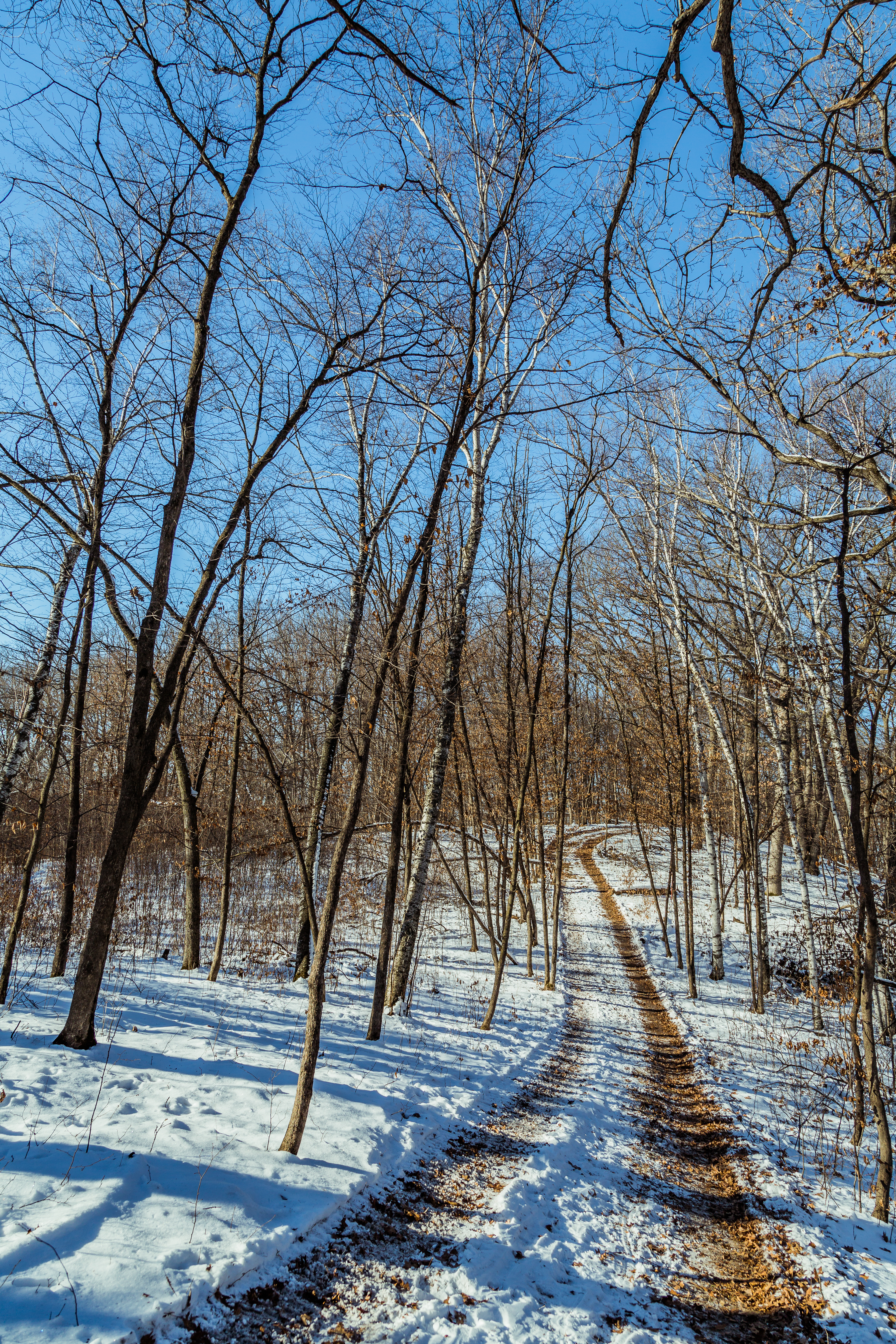 Lake Maria State Park, Monticello, Minnesota